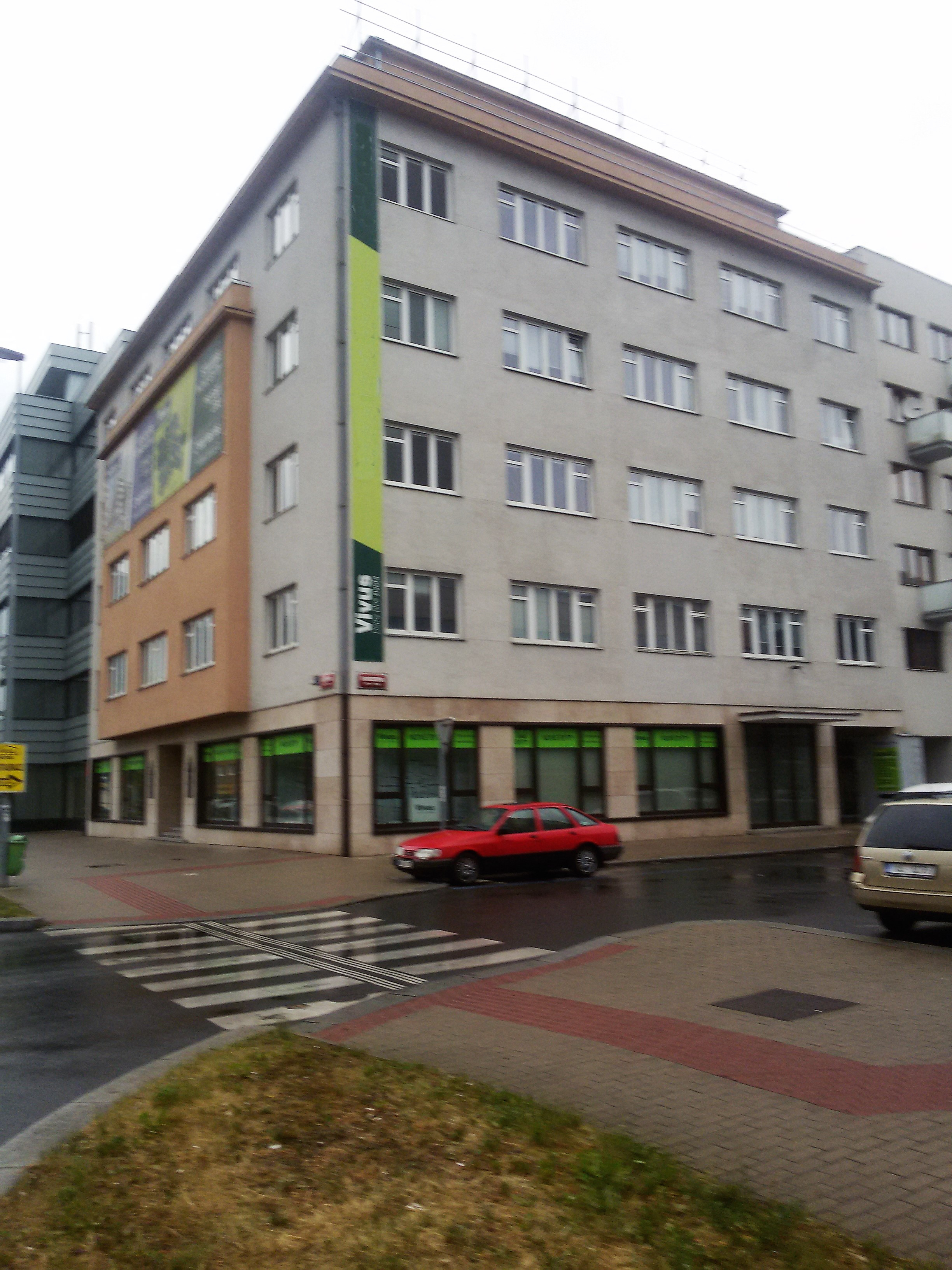 Zelená liška, býv. administrativní budova Jawa (stav 2018)